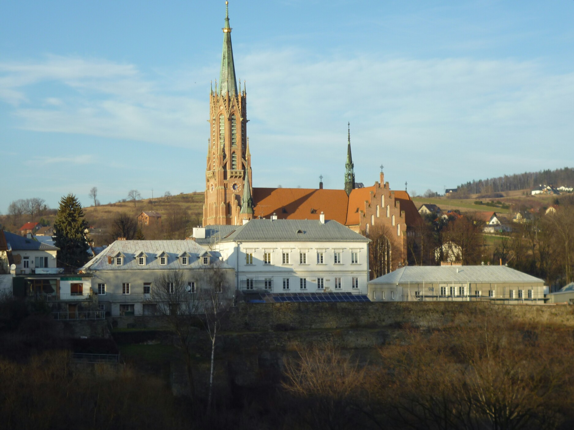 Bazylika Mniejsza pw. św. Katarzyny Aleksandryjskiej w Grybowie Dwór Hoschów ,obecnie Zakład Opiekuńczo-Leczniczy im. ks. Biskupa Karola Pękali w Grybowie